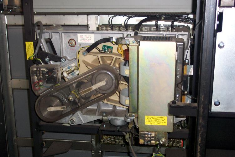 Bildbeschreibung: System /34 Plattenlaufwerk Quelle: selbst fotografiert Fotograf/Zeichner: Oliver Obi